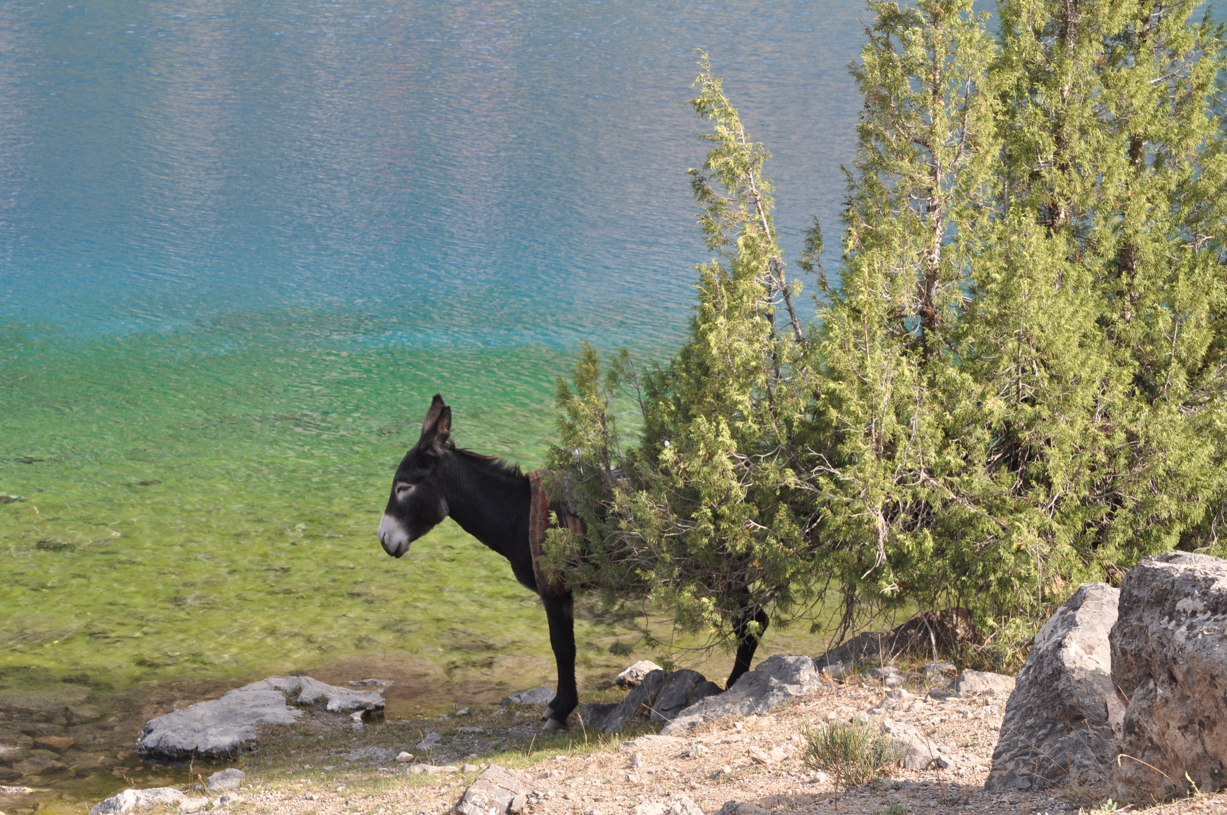 Фотосессия - "Фанские горы в Таджикистане"